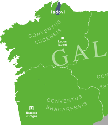 Mapa que amosa a situación aproximada da tribo dos iadovos na provincia romana da Gallaecia.